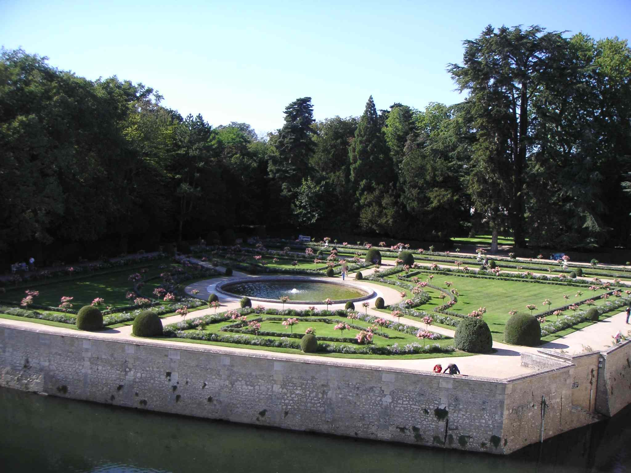 Vue du jardin Catherine de Médicis depuis le château de Chenonceau (France)